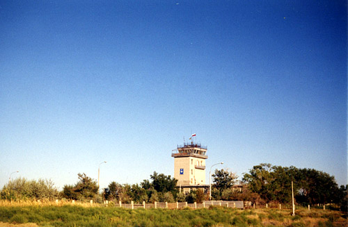 Аэропорт Крайний (лето).